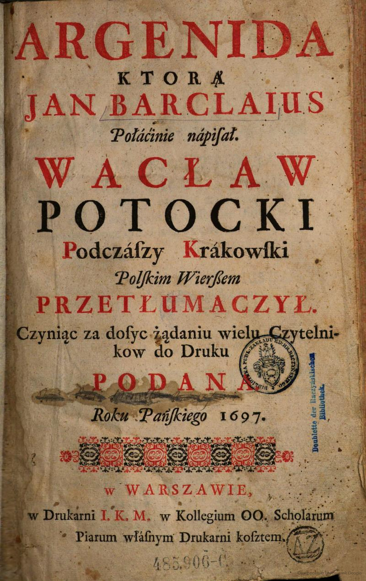 Перевод Вацлава Потоцкого